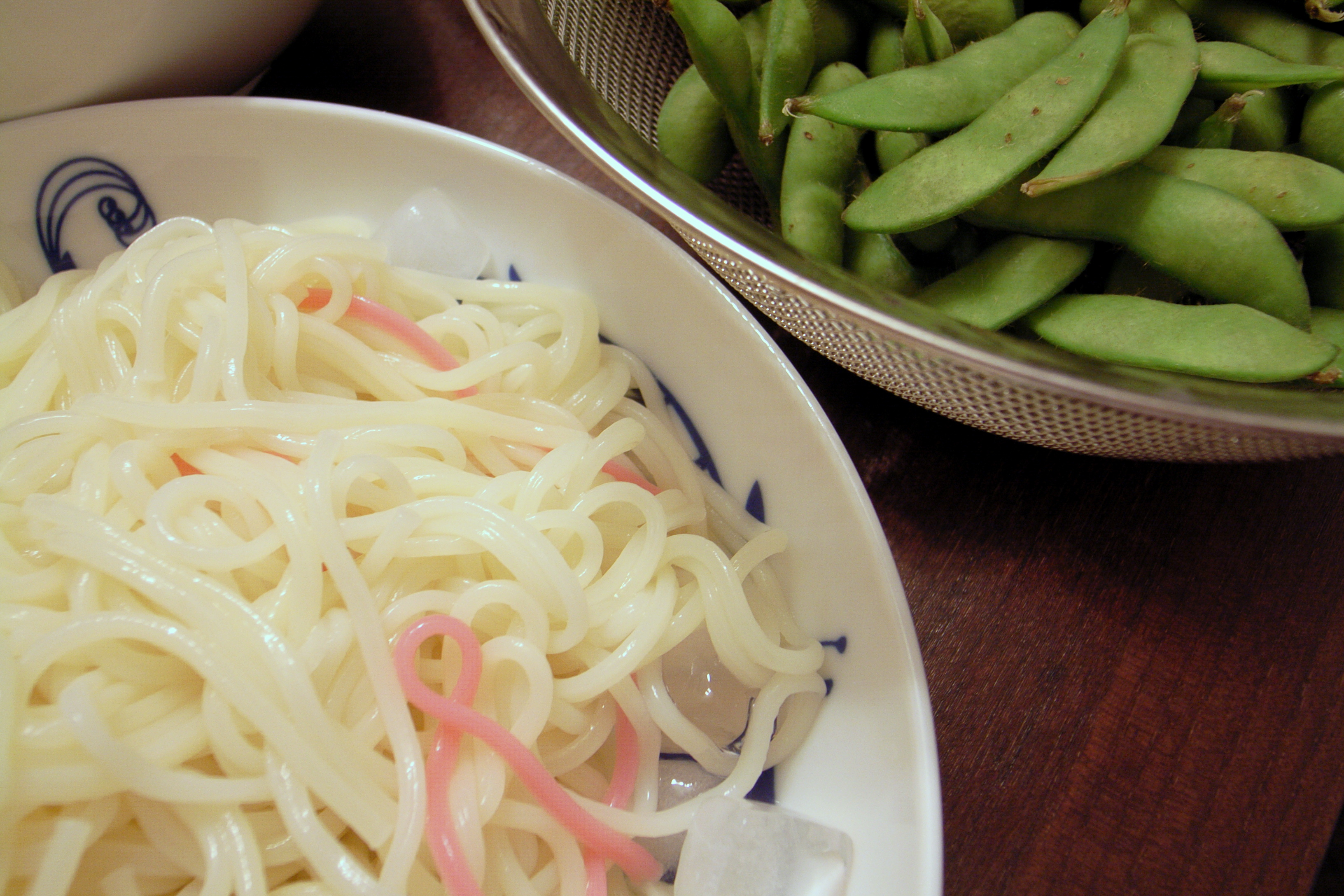 Hiyamugi